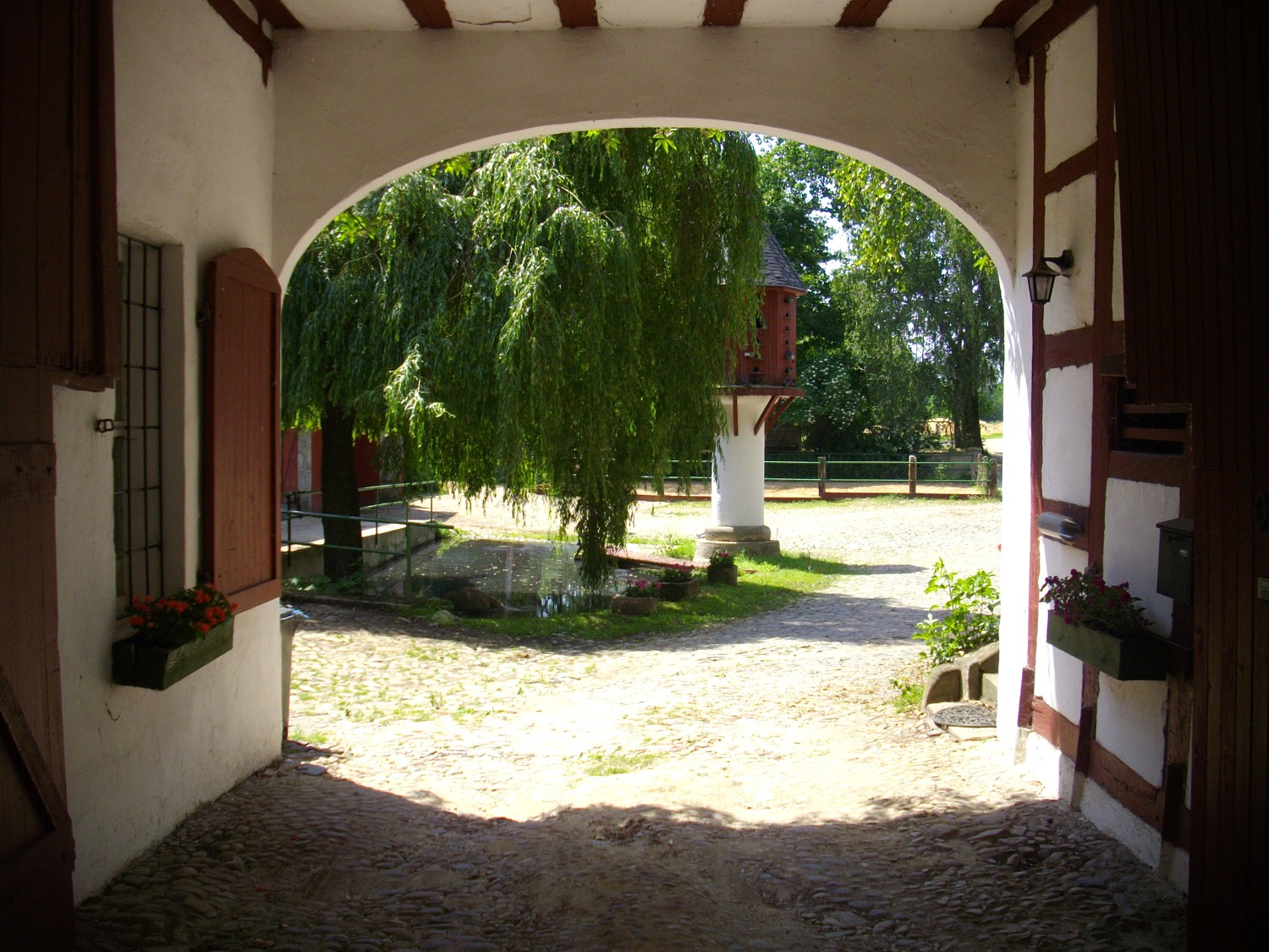 Brösen bei Groitzsch, Eingang zum denkmalgeschützten Köhlerhof, Blick zum Innenhof mit seltenem Taubenhaus